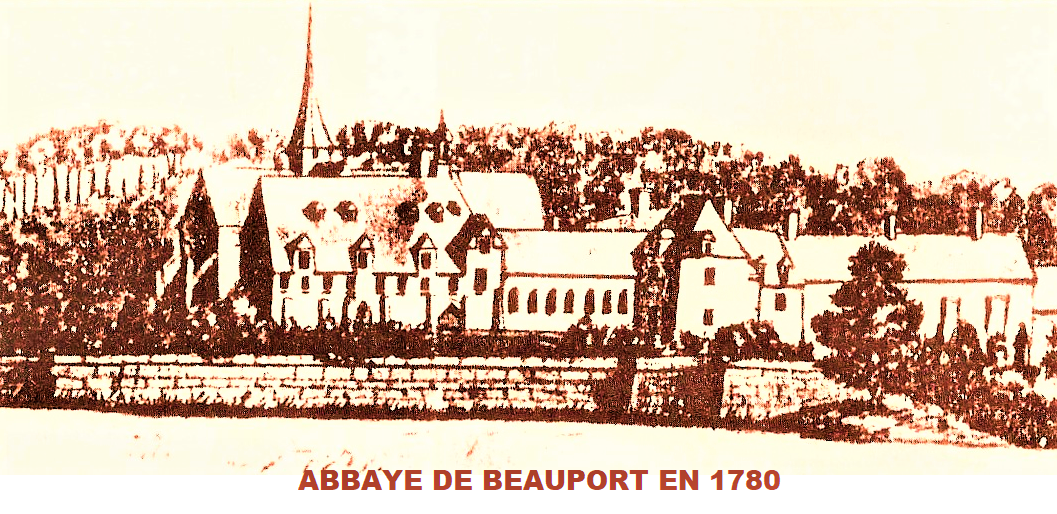 Gravure de l'abbayede Beauport en 1780